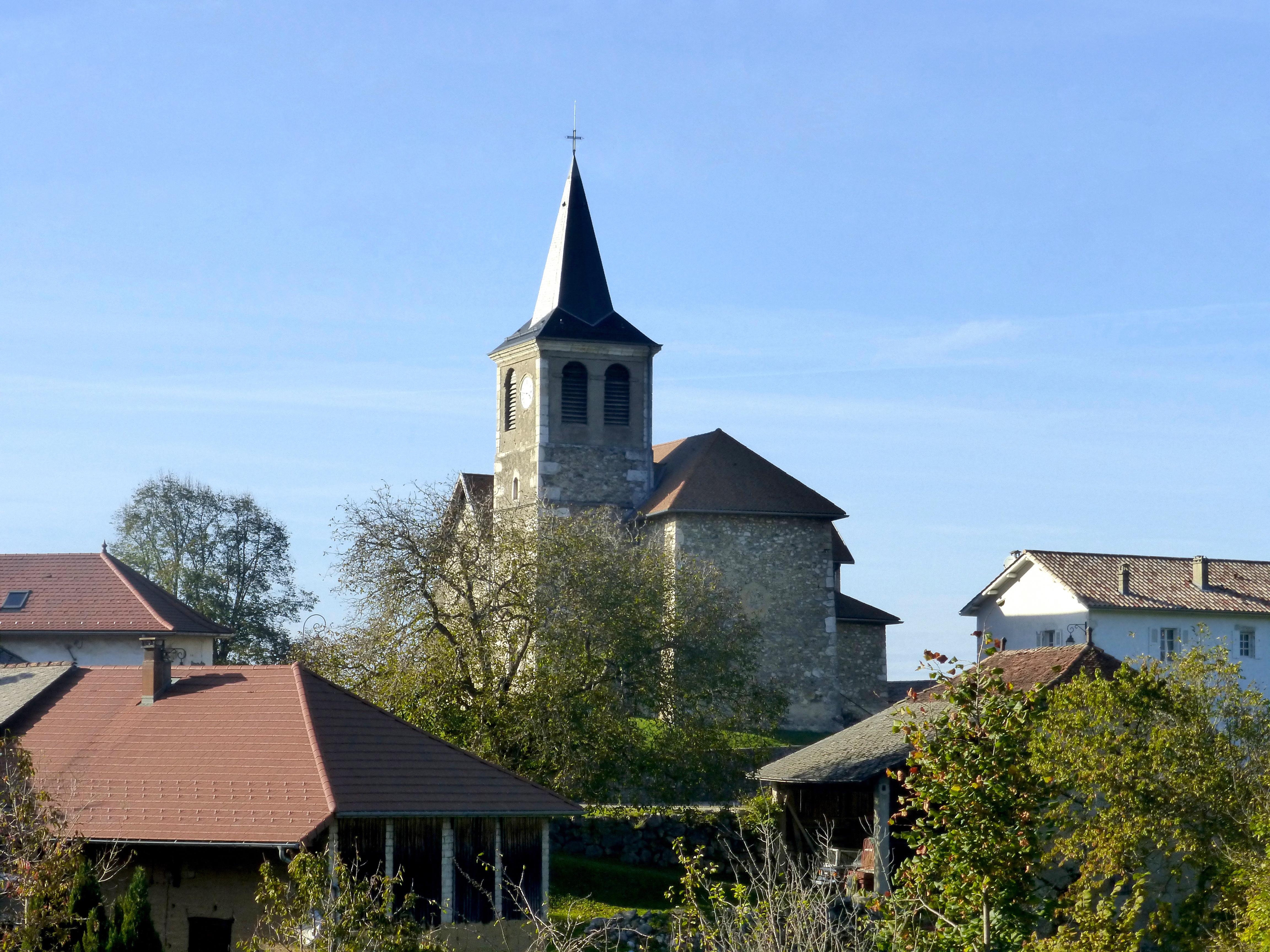 Village de Merlas. Vue sur l'église